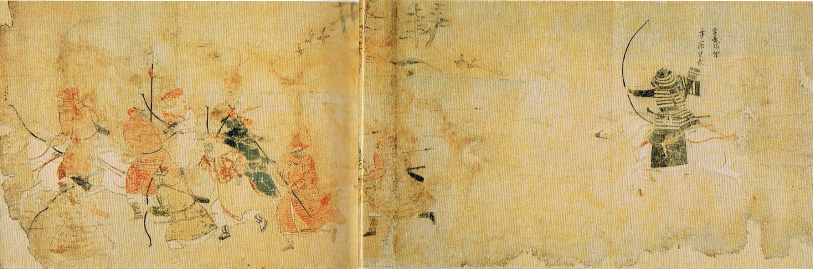 『蒙古襲来絵詞』 前巻【絵六】逃げる蒙古兵に矢を射る三井資長（竹崎季長の姉婿）